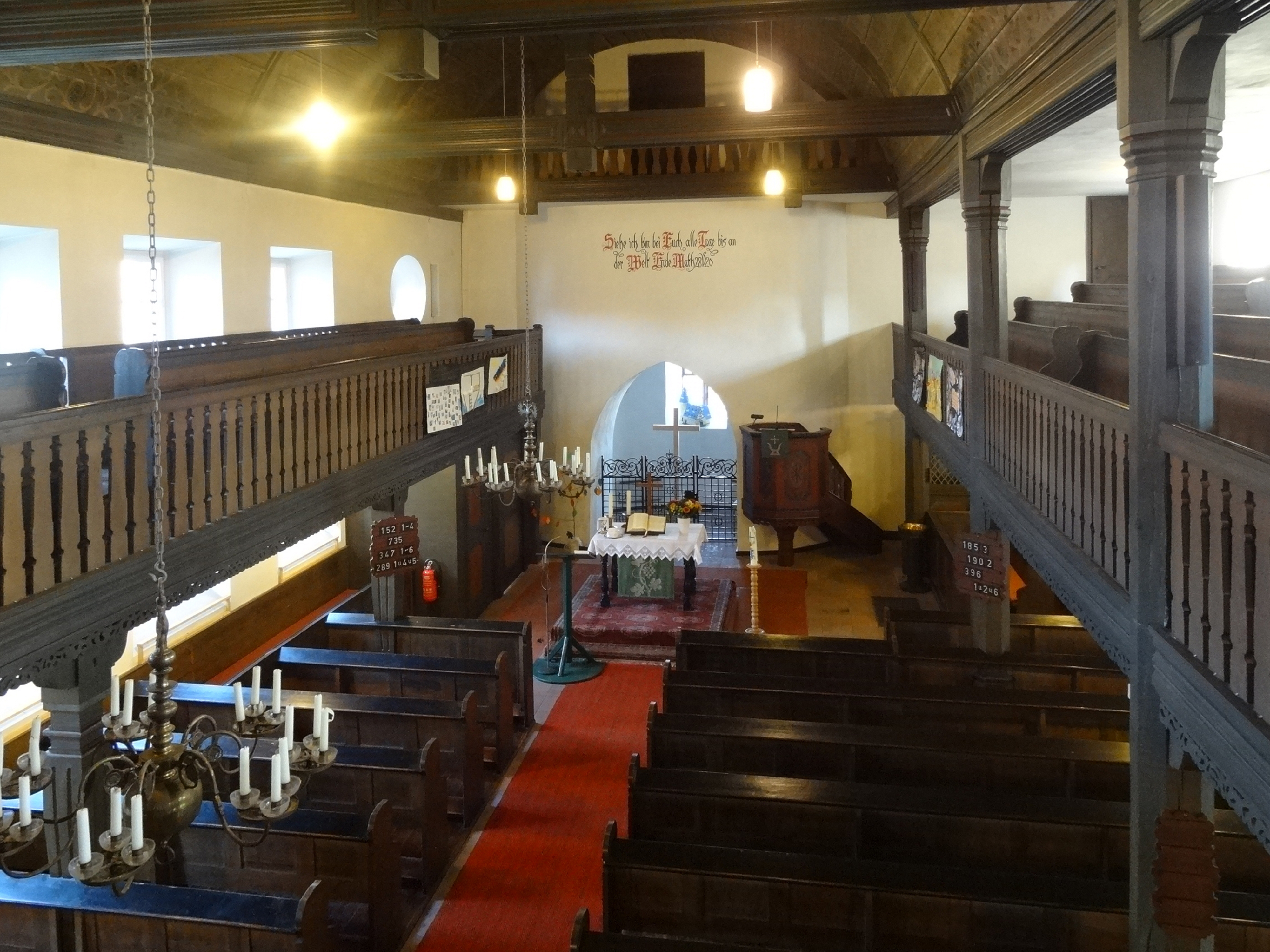 Evangelische Pfarrkirche (Griedel)